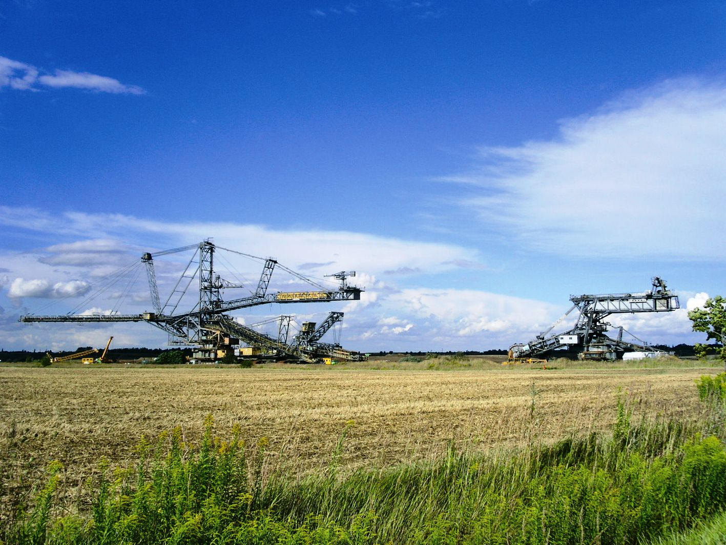 Absetzer 1115 (links) und Bagger 1547 (rechts) im Bergbau-Technik-Park